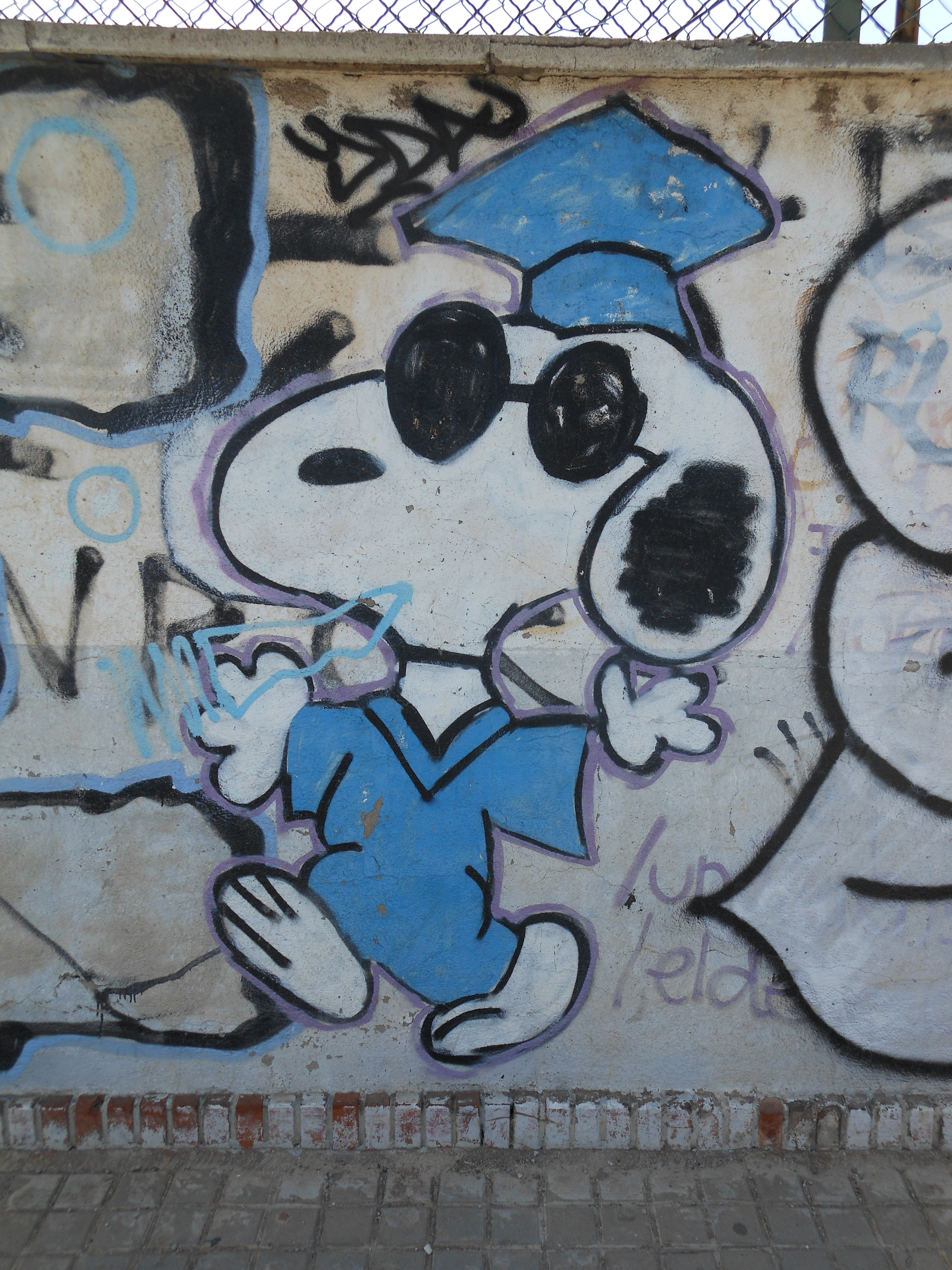 Grafit d'Snoopy ubicat a Sant Adrià de Besòs